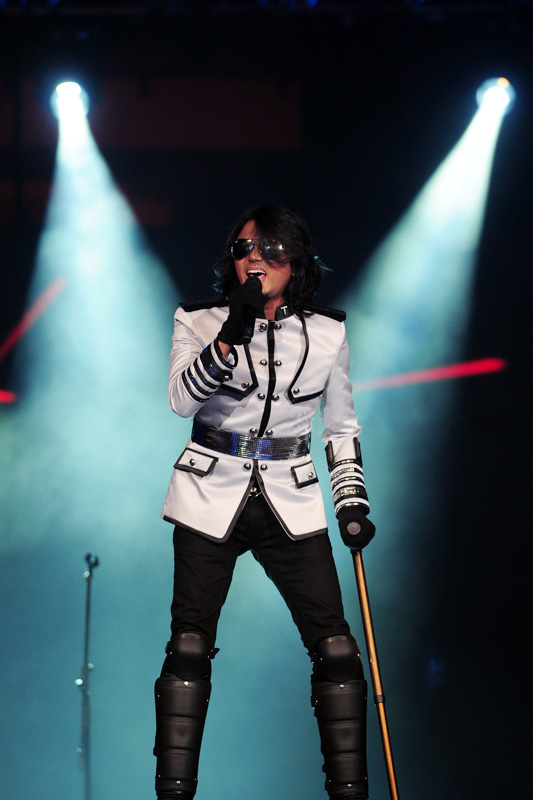 Anugerah Juara Lagu 24